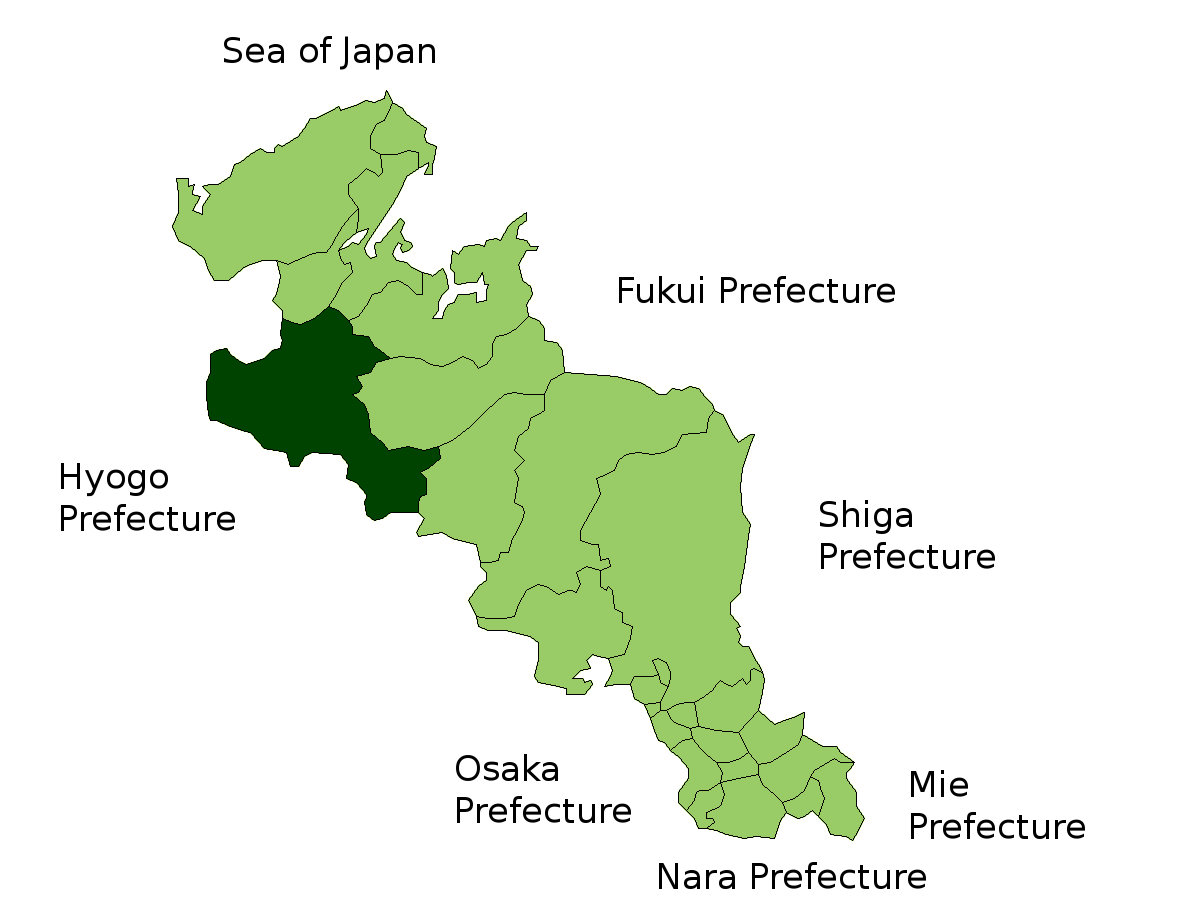 Location Map of Fukuchiyama in Kyoto-fu, Japan